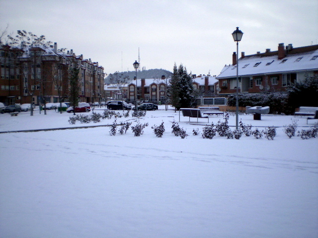 La Cisterniga nevada